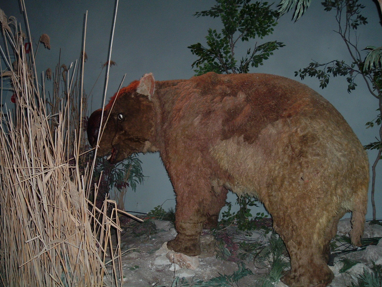 Diprotodón Animatrónico, Naracoorte Caves national park, Naracoorte SA, Australia